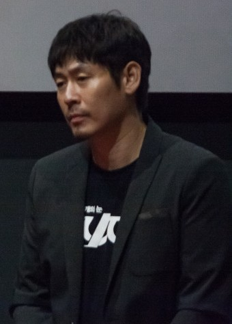 130706 감시자들 무대인사 in CGV 왕십리